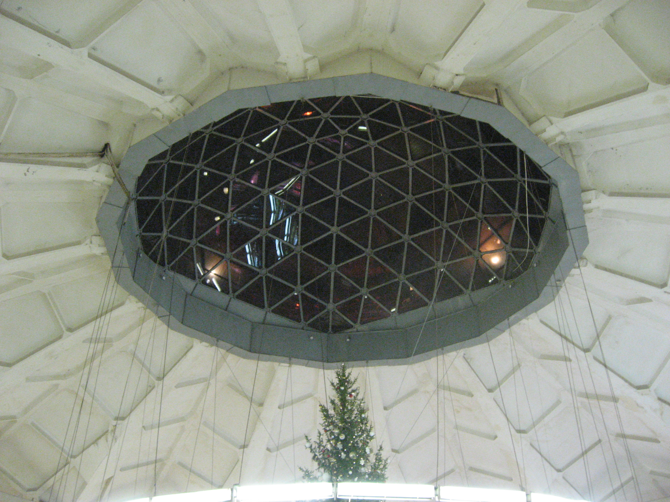 Башҡортса: Конструкции оболочек КЖС Даниловский рынок,Москва. Конструктор:Канчели, Нодар Вахтангович Даниловский базарынын тушэм - КЖС. Конструктор:Канчели, Нодар Вахтангович.